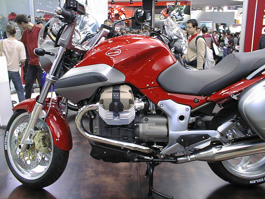 Moto Guzzi Breva 1100 - Mondial du deux roues de Paris, 2003.